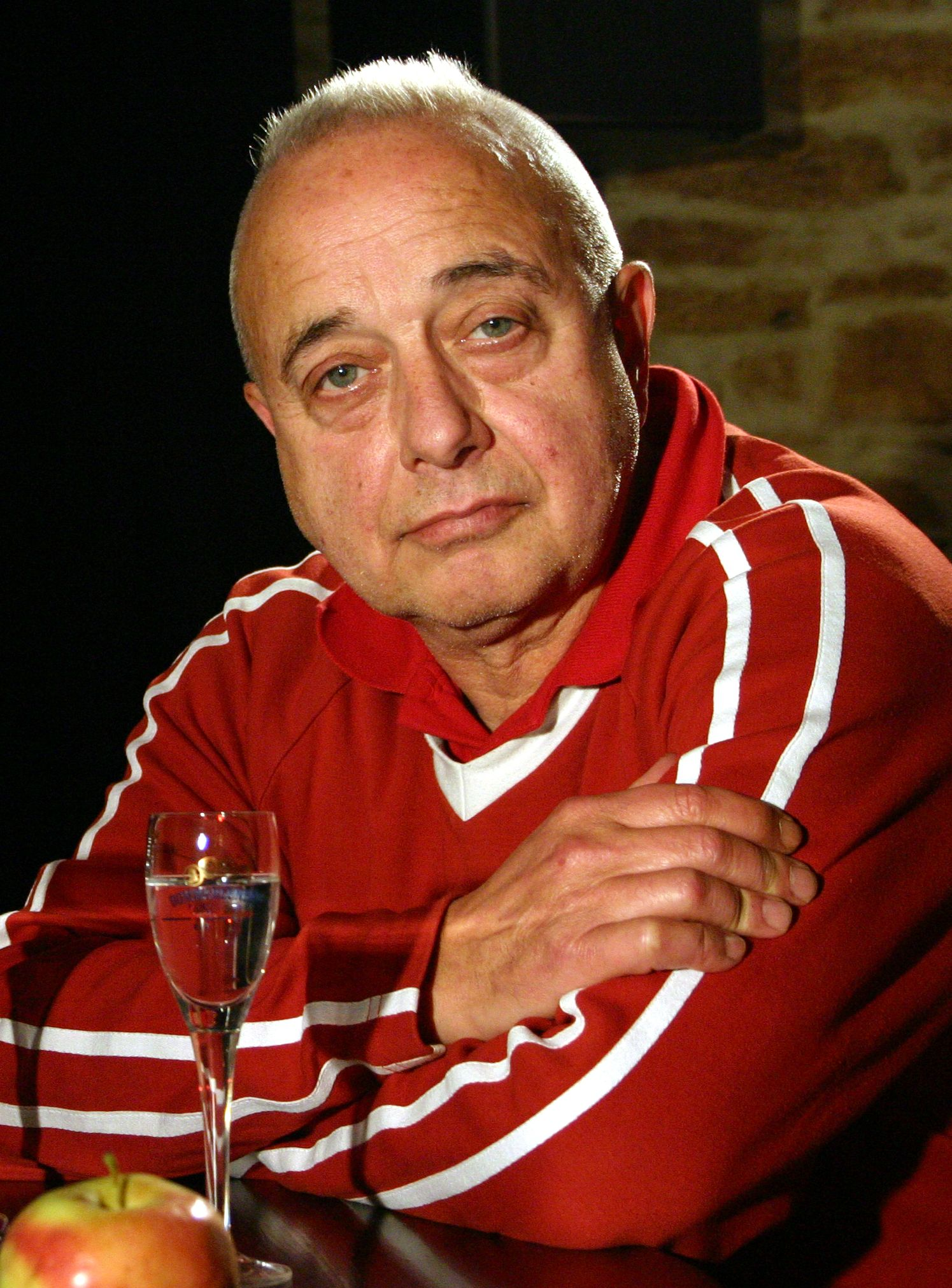 Peter Behrens . German musician, actor and clown.